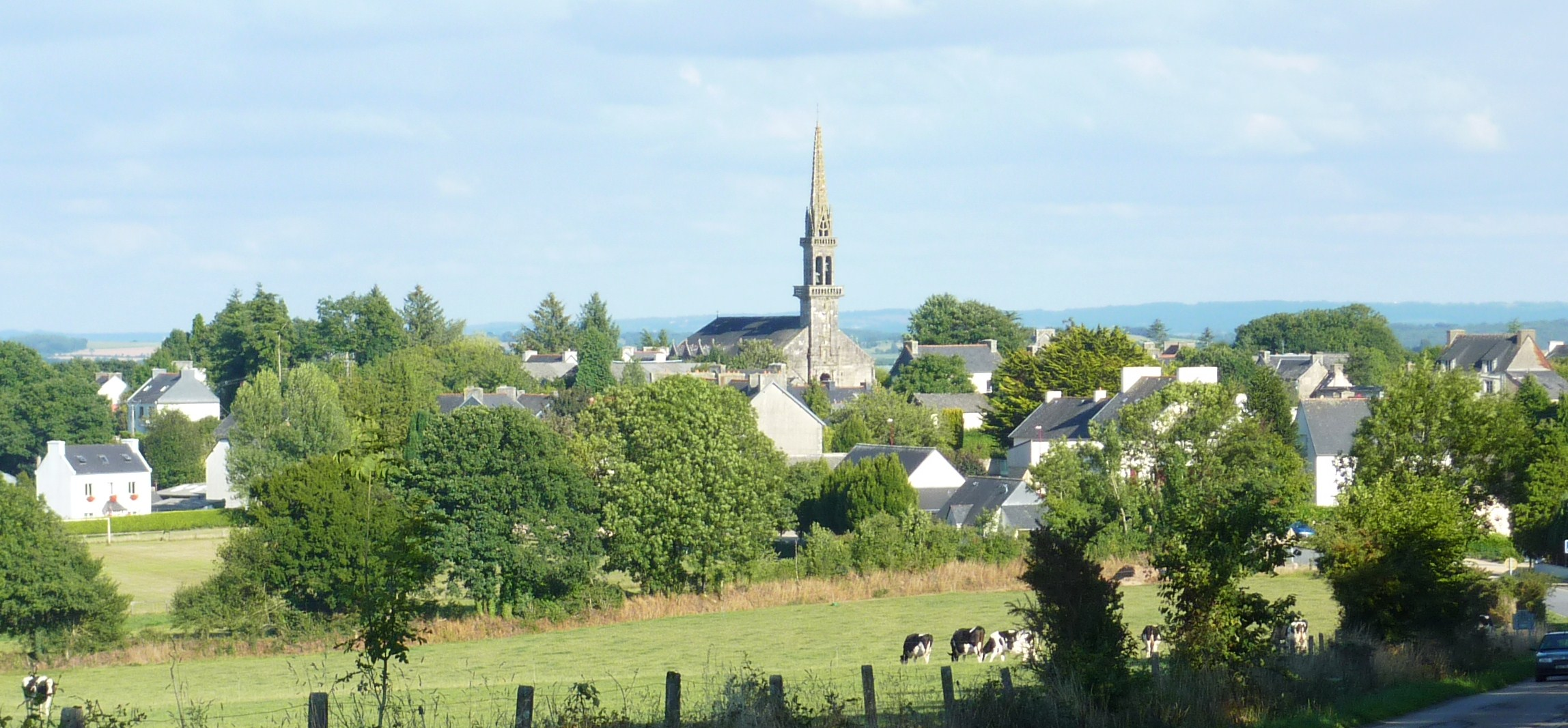 Plouyé: le bourg vu de la route venant du Huelgoat